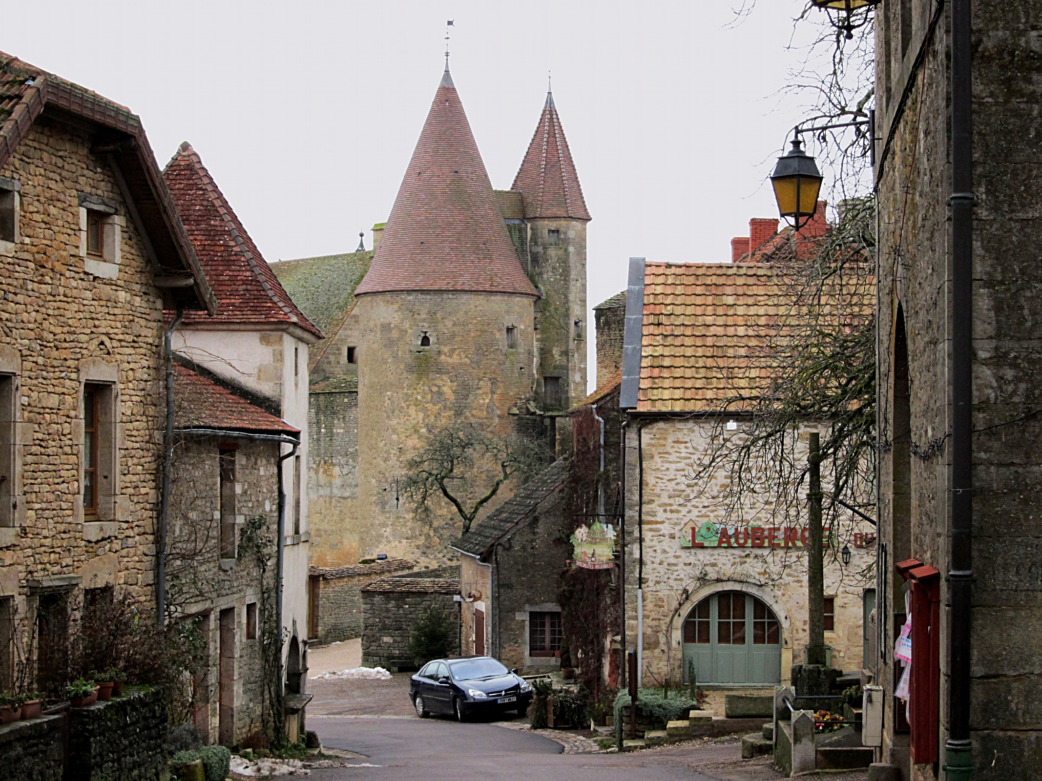 Vue sur le château de Châteauneuf (Côte-d'Or) depuis le village.